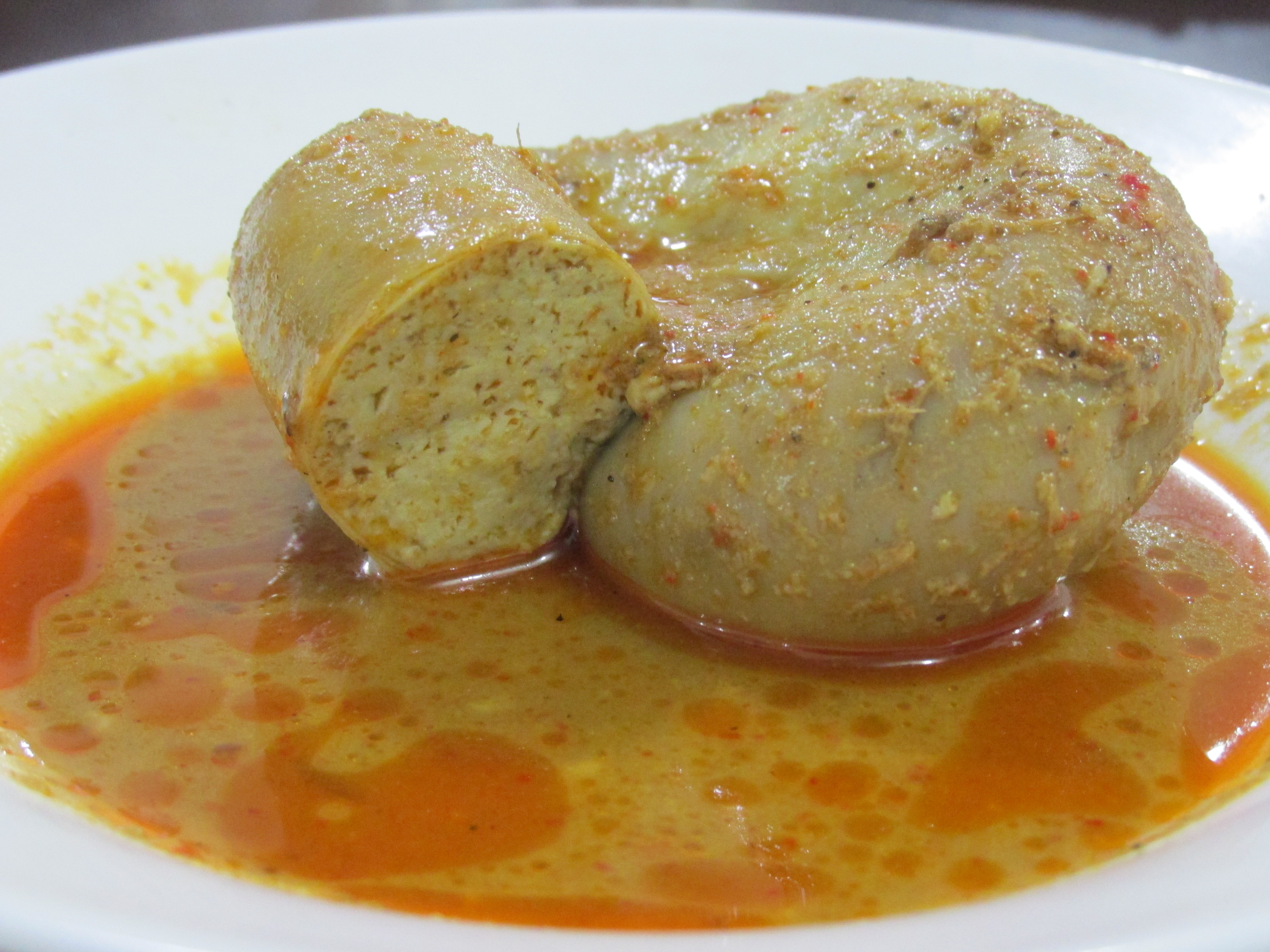 sepotong gulai tambunsu